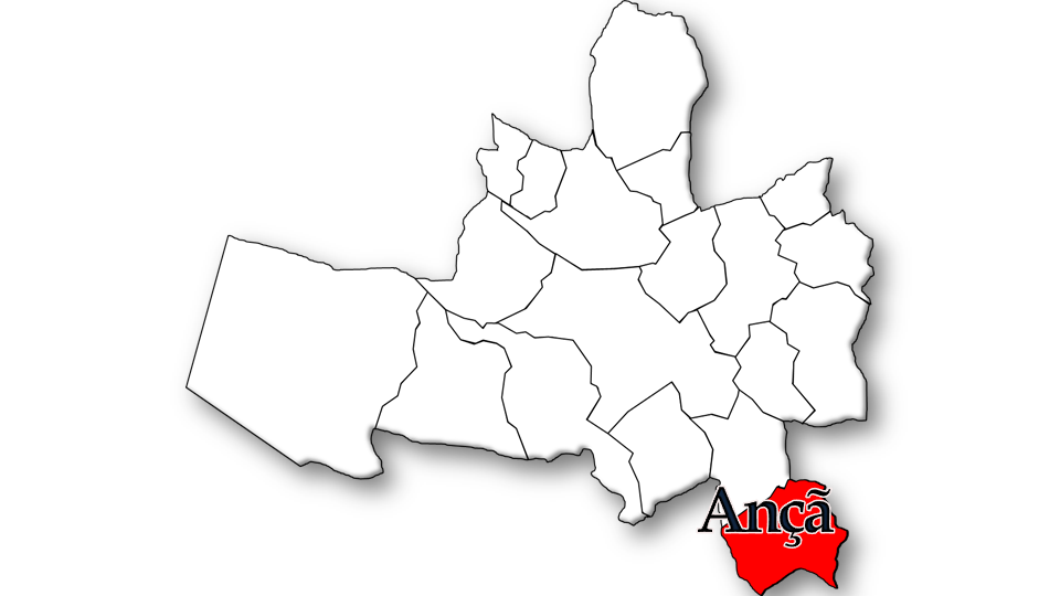 Português